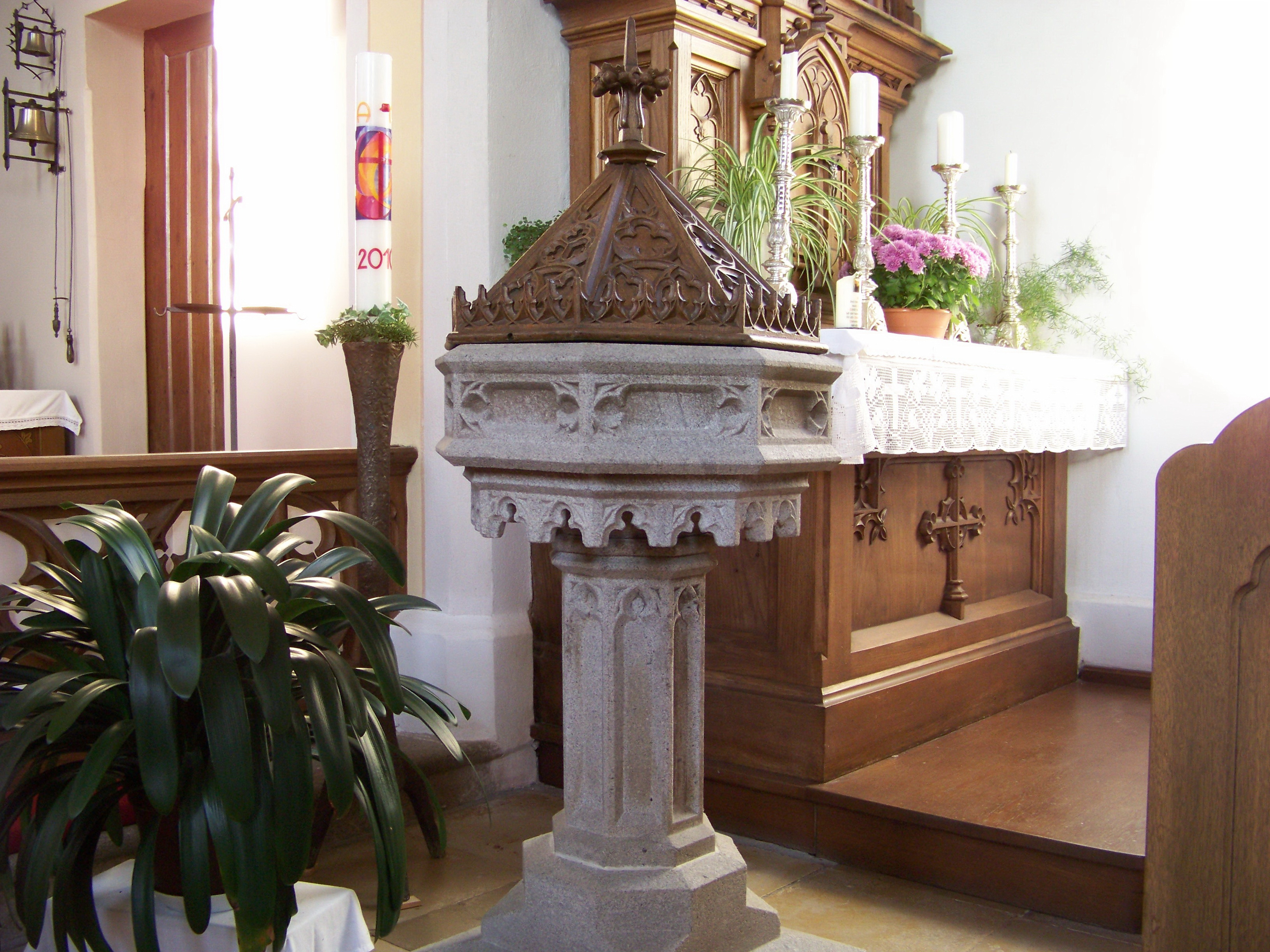 Laberweinting, Franken 13, katholische Expositurkirche St. Nikolaus. Taufstein.